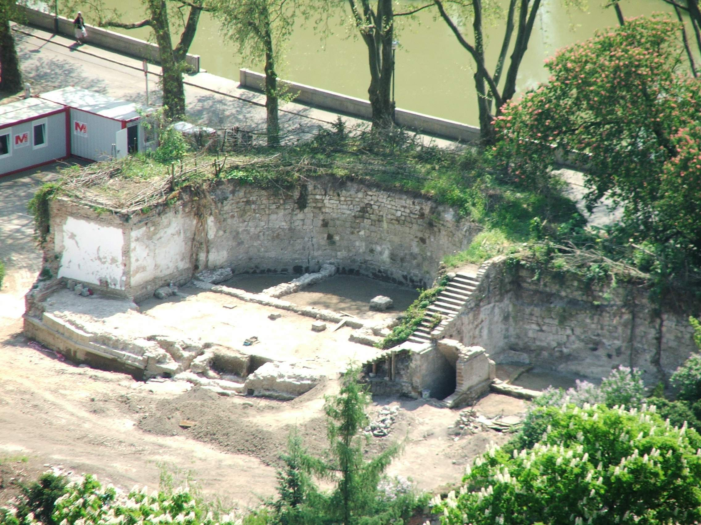 Mattyasovszky-bástya, 2009